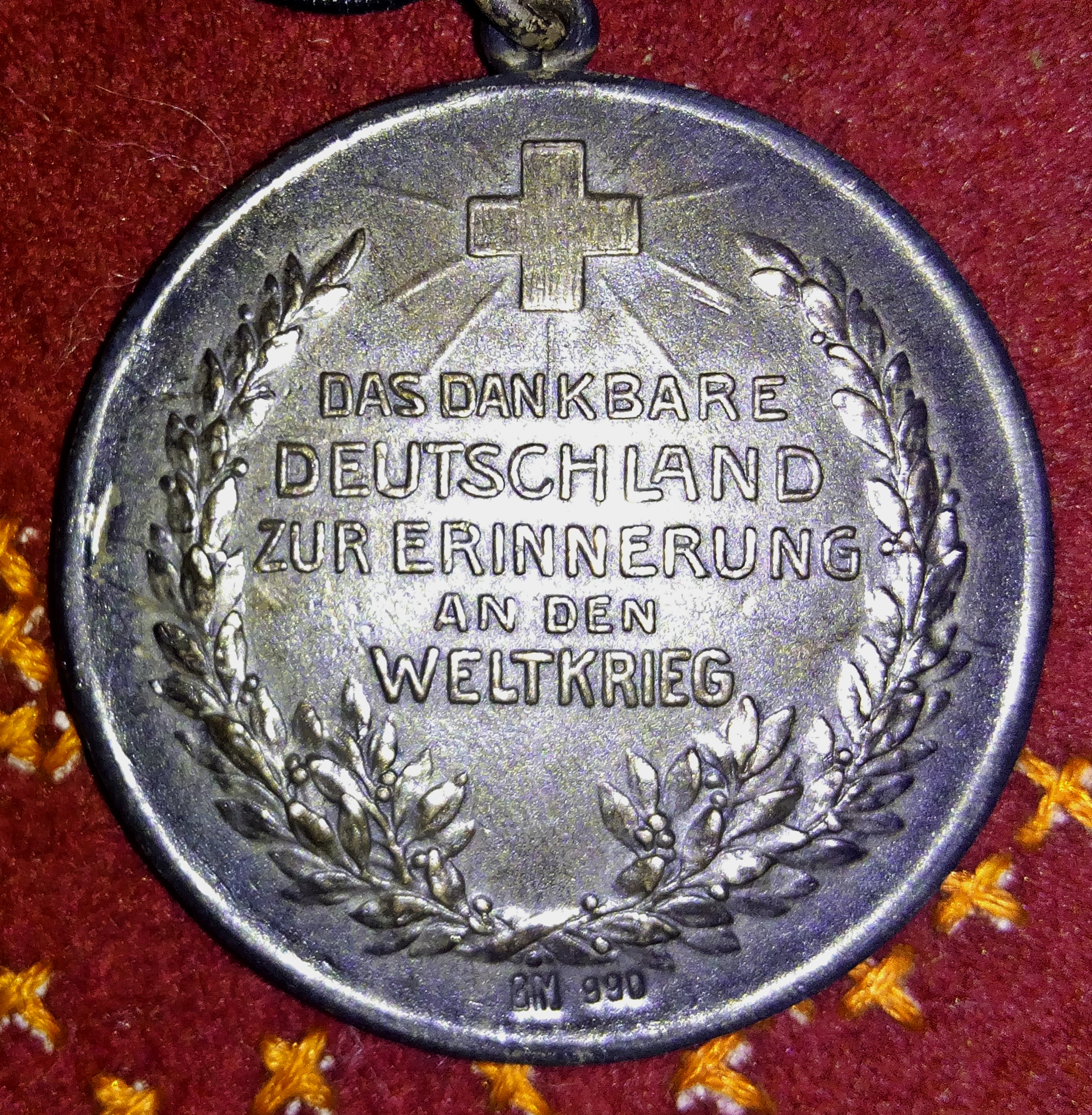 Deutsches Reich, Helvetia-Benigna-Medaille, 1917, Rückseite